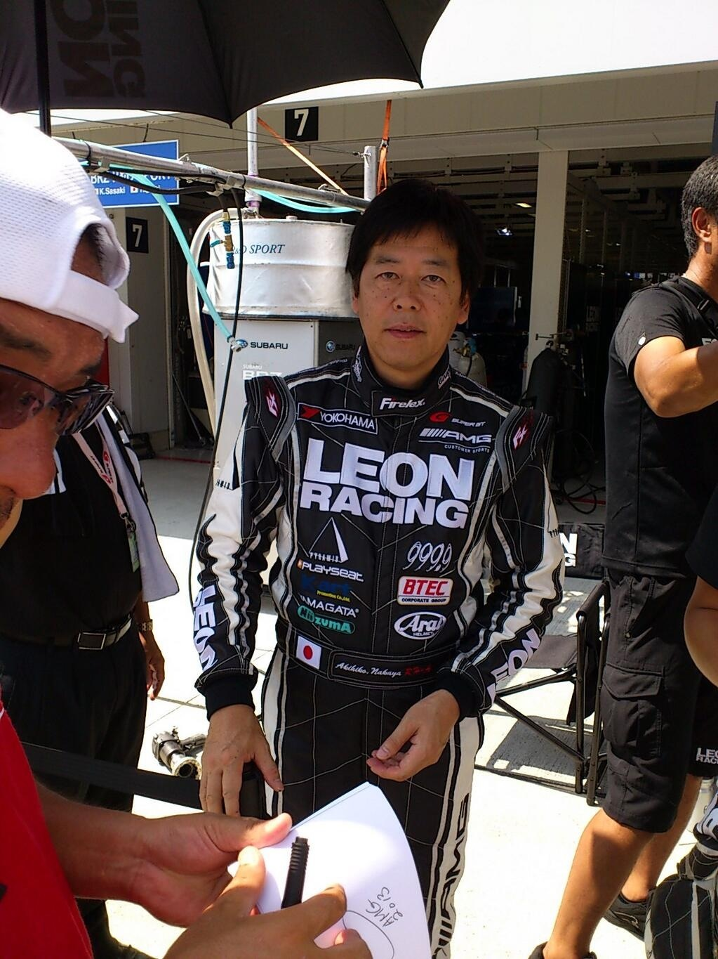 2013 SUPERGT Rd,5 Suzuka1000km